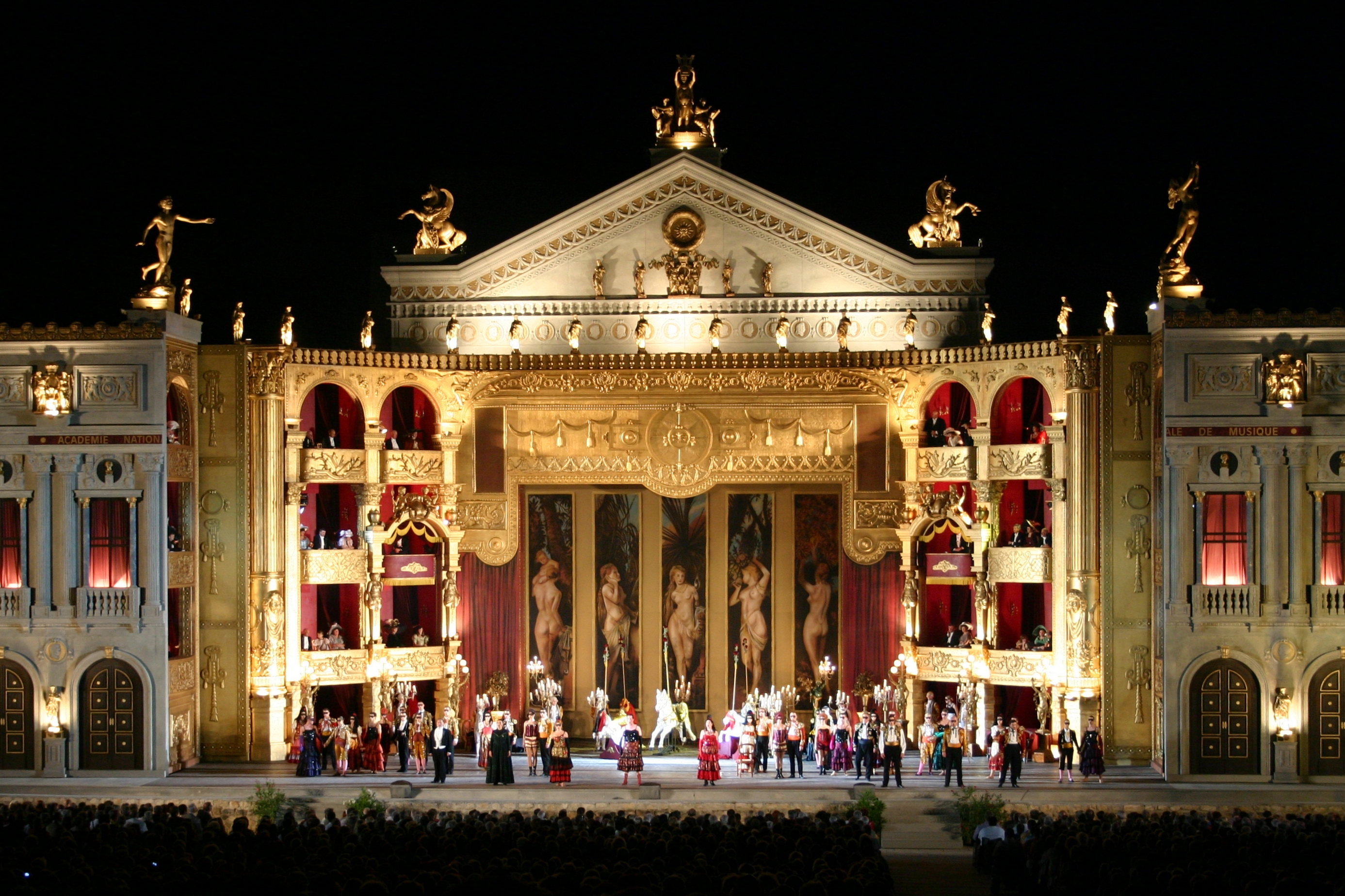 La Traviata - Bühnenbild offen (Bild 1). 31. Juli 2008 auf der Freiluftbühne der Opern-Festspiele im Römersteinbruch in Sankt Margarethen